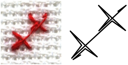 хрестоподібні елементи